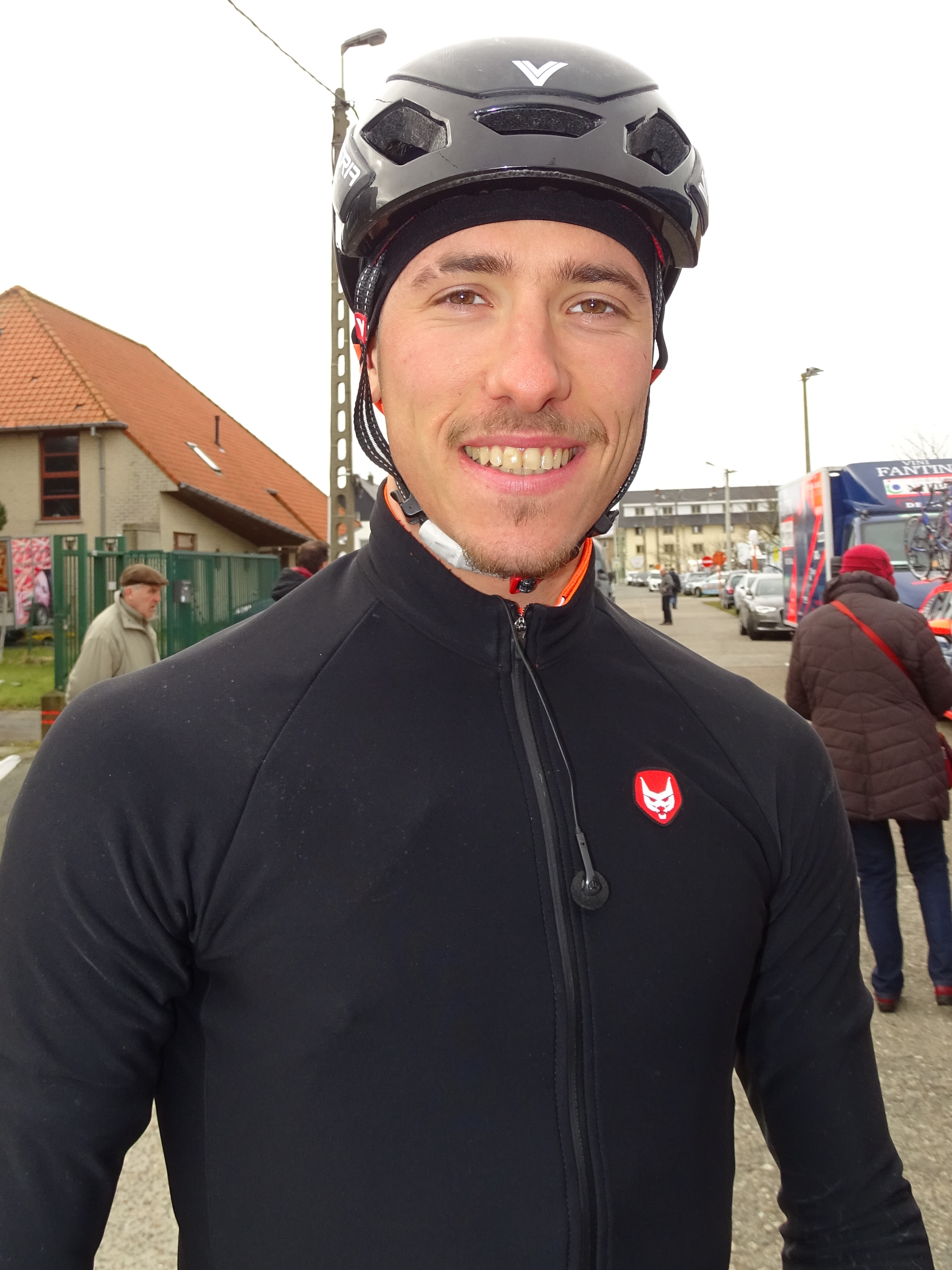 Reportage réalisé le vendredi 18 mars à l'occasion du départ de la Handzame Classic 2016 à Bredene, Belgique.